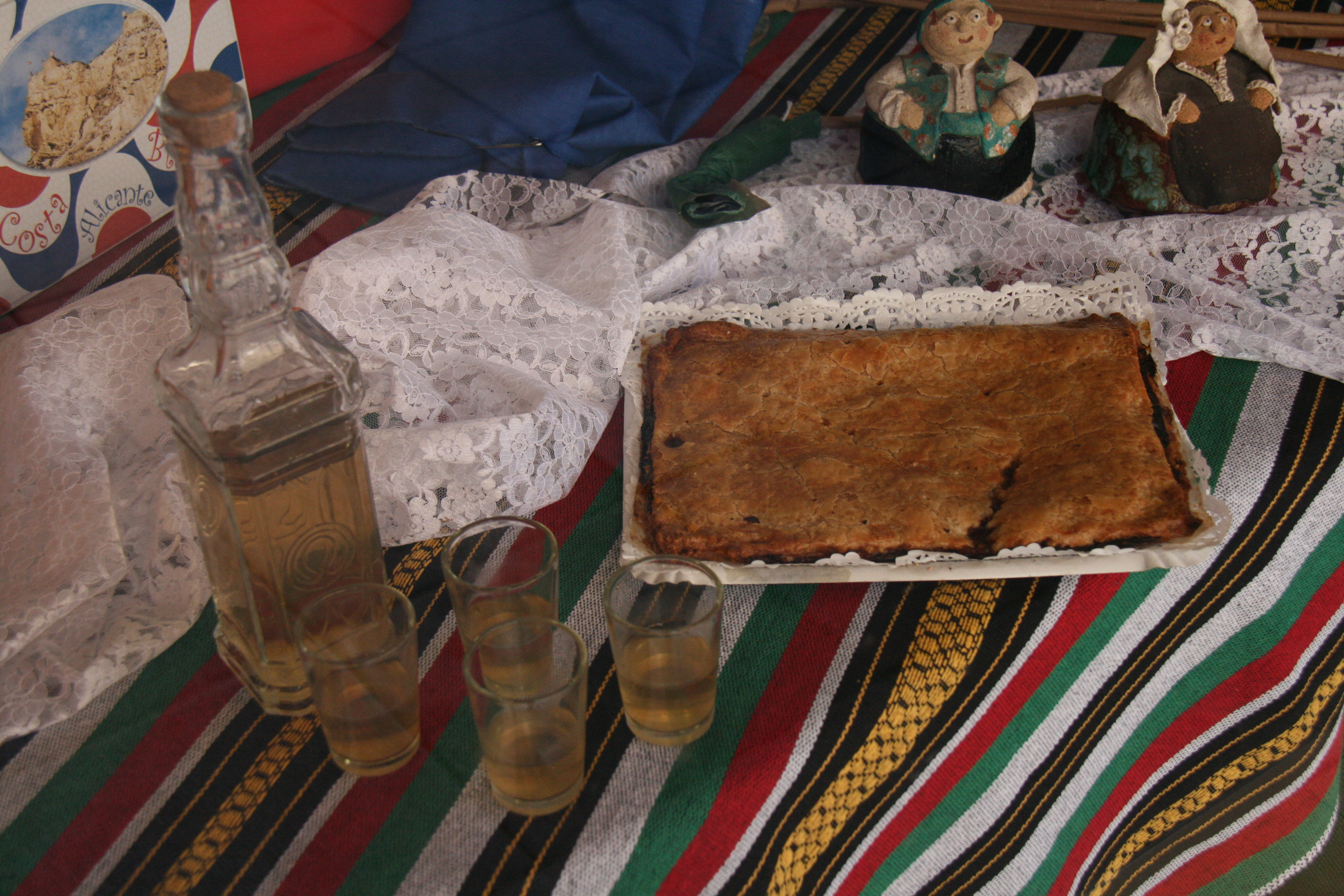 Coca toñina - alicante